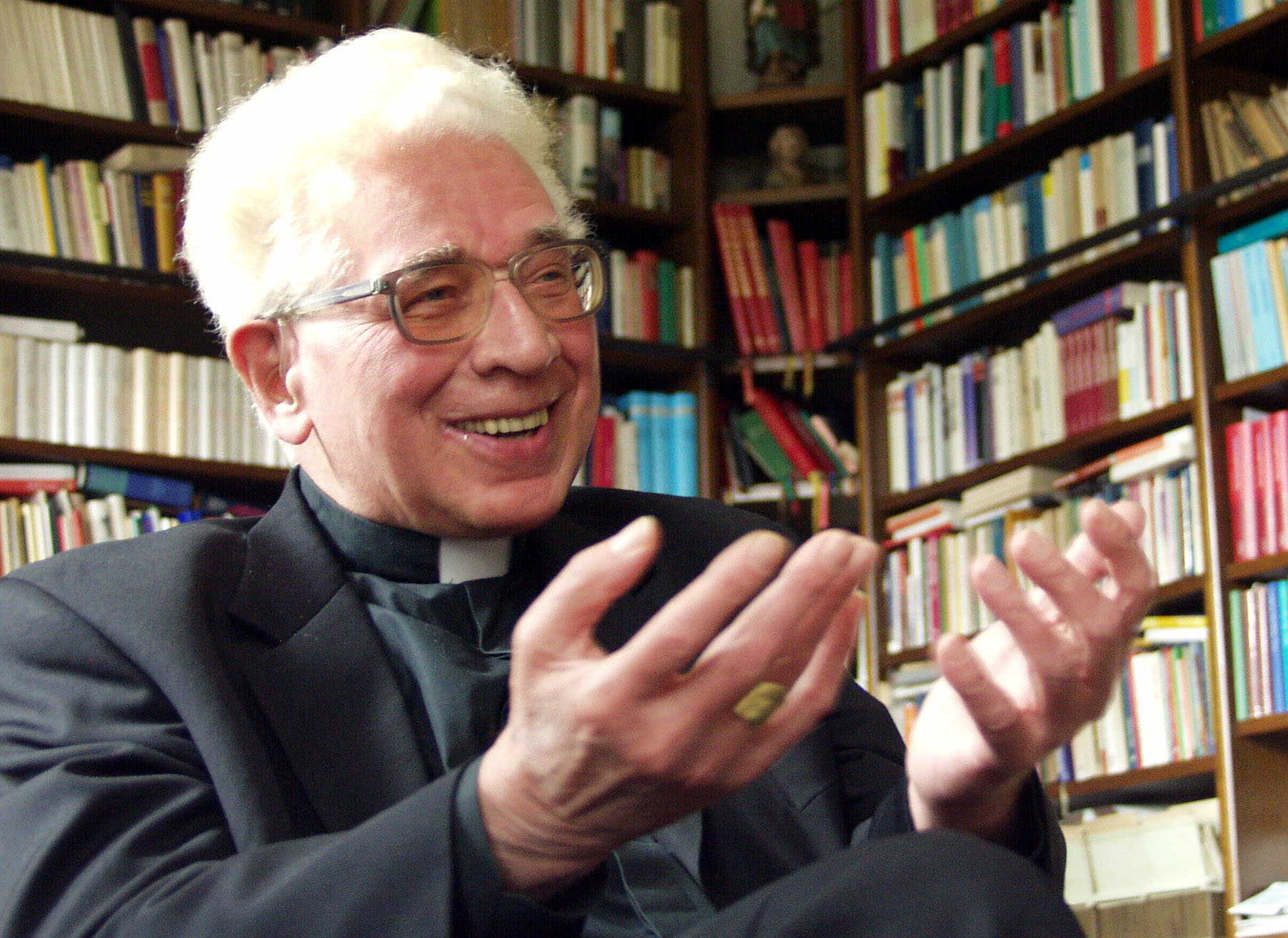 Beschreibung, Quelle und Lizenz Dr. Josef Homeyer, Bischof von Hildesheim von 1983 bis 2004, fotografiert am 17. Mai 2004